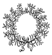 Corona obsidionalis (Belagerungskranz)